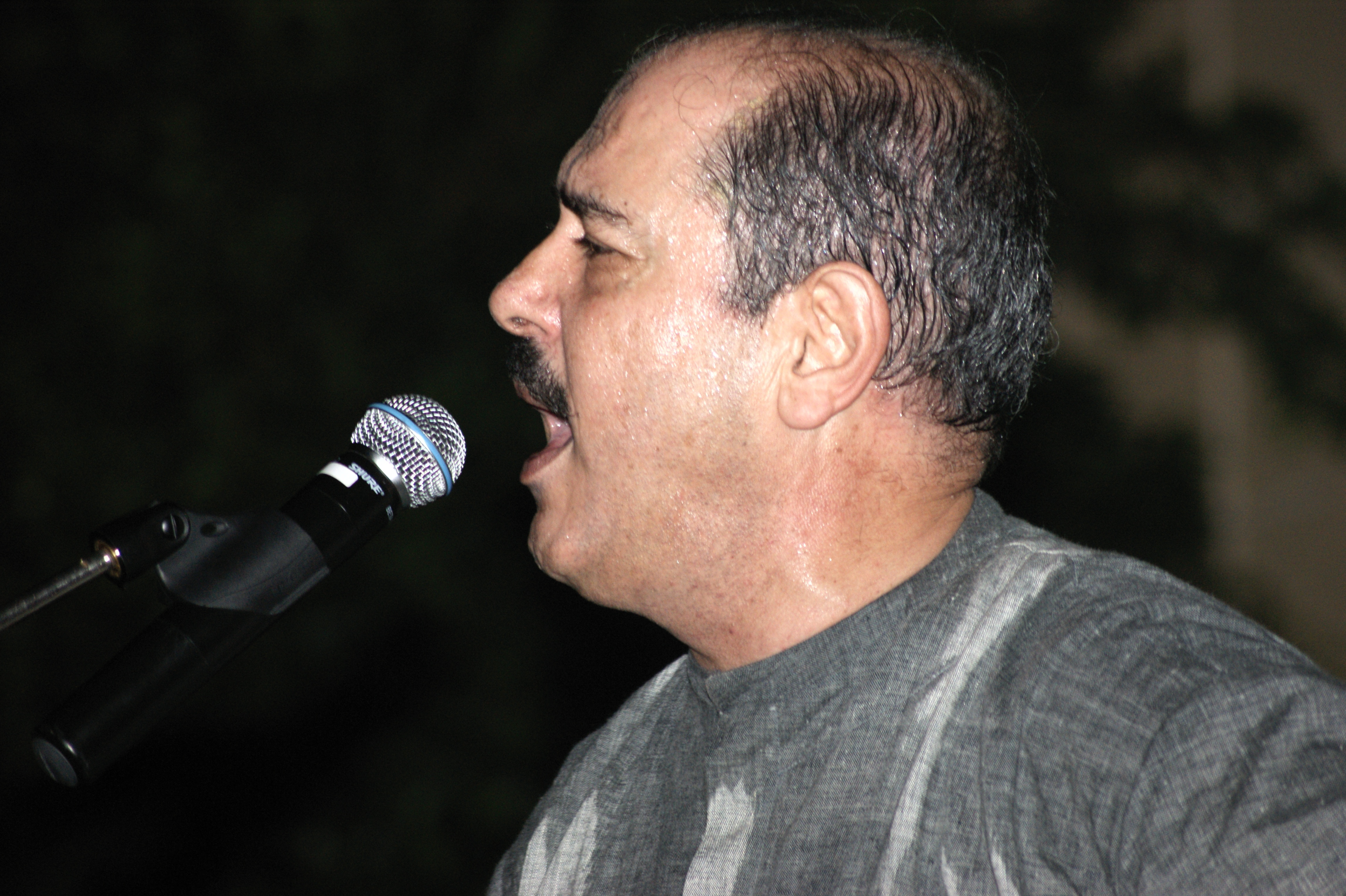 L'artiste tunisien Lotfi Bouchnaq se produisant à Sayada pendant le spectacle d'inauguration de la première session du Festival de la Médina, au lycée 7 novembre de Sayada le 08 septembre 2008.